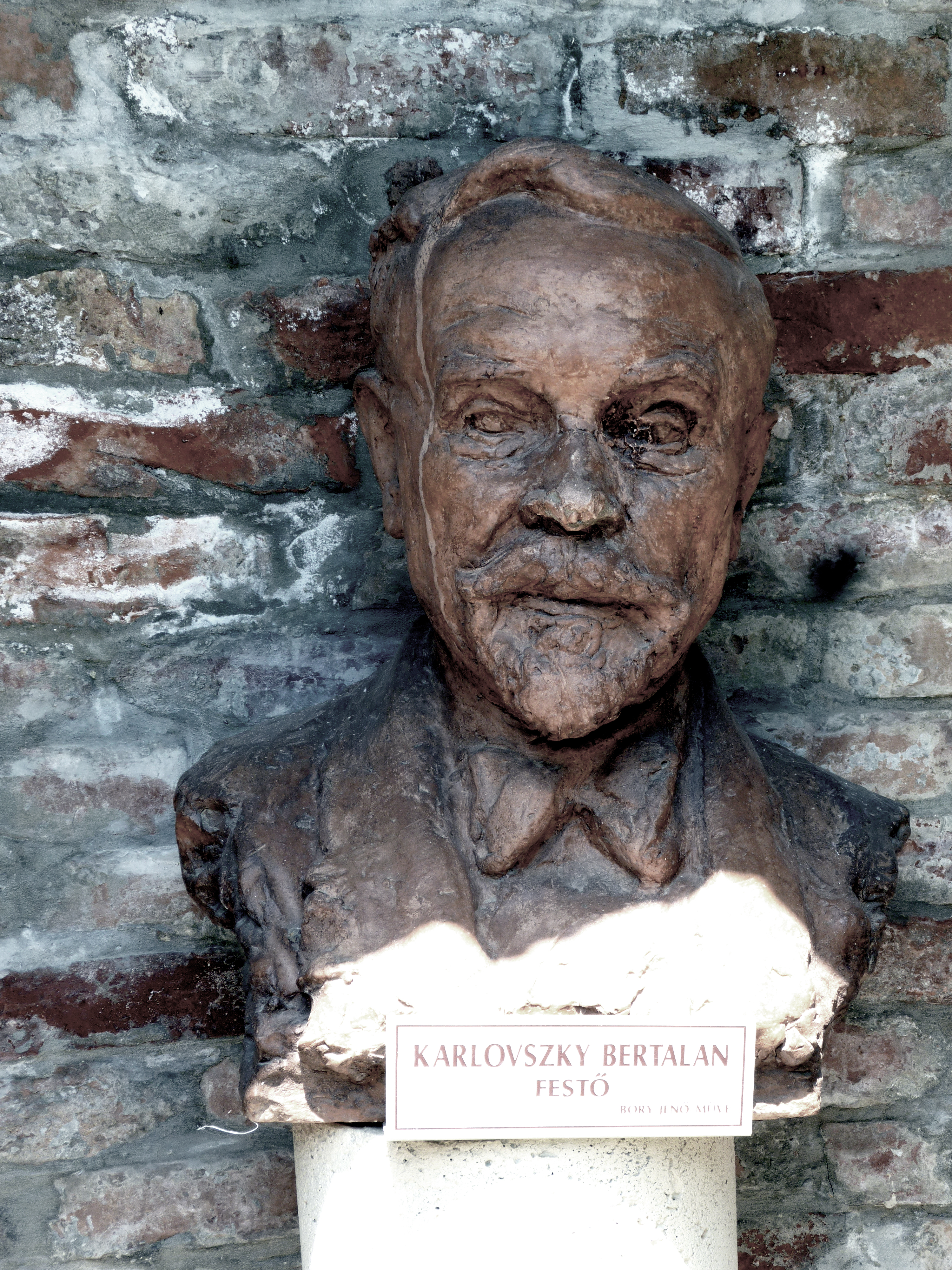 Bory Jenő: Karlovszky Bertalan mellszobra (Bory-vár, Székesfehérvár)